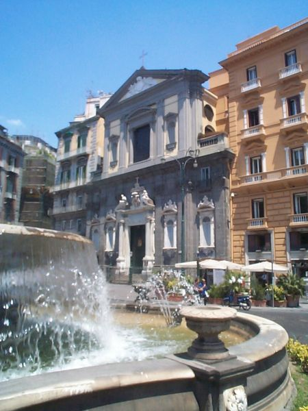 Napoli: Piazza Trieste e Trento e Facciata di San Ferdinando